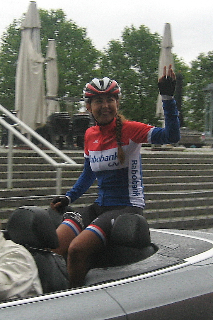 Nederlands kampioene Anouska Koster (Rabo-Liv) voor start van het criterium "De Ridderronde" in Maastricht op 3 augustus 2016